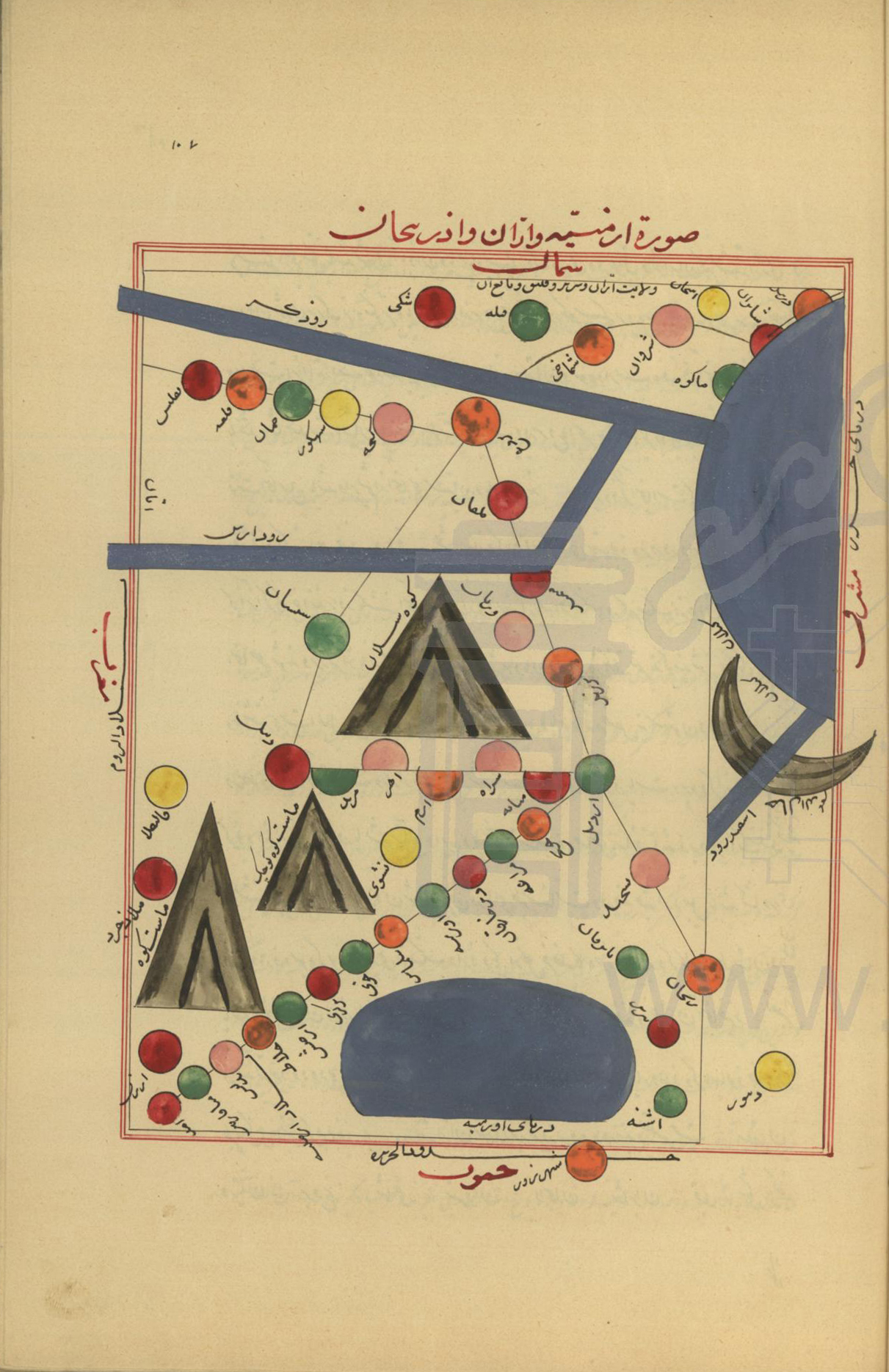 ترجمه کتاب مسالک و ممالک